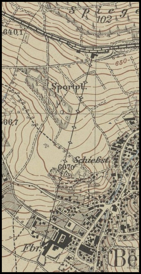 Lageplan und Verlauf zur Frankonia-Seilbahn am westlichen Ortsrand von Beierfeld.